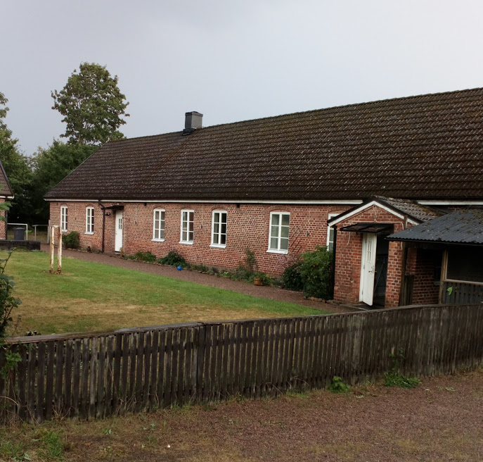 Gryttinge skolhus i rött tegel. Beläget i Gryttinge by.